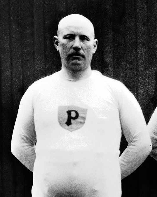 Arvid Leander Andersson